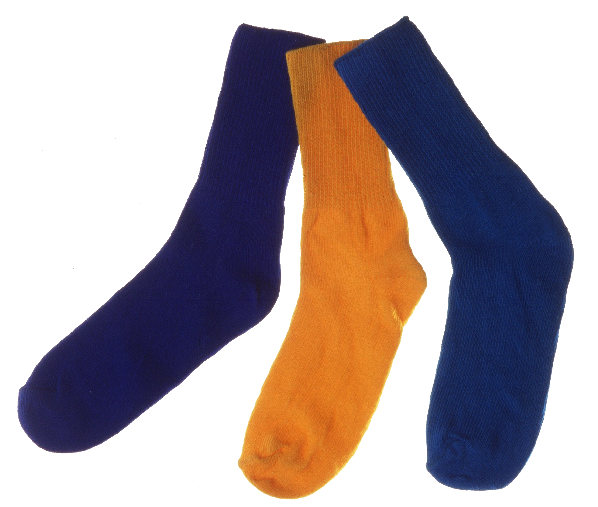 flame retardant cotton socks